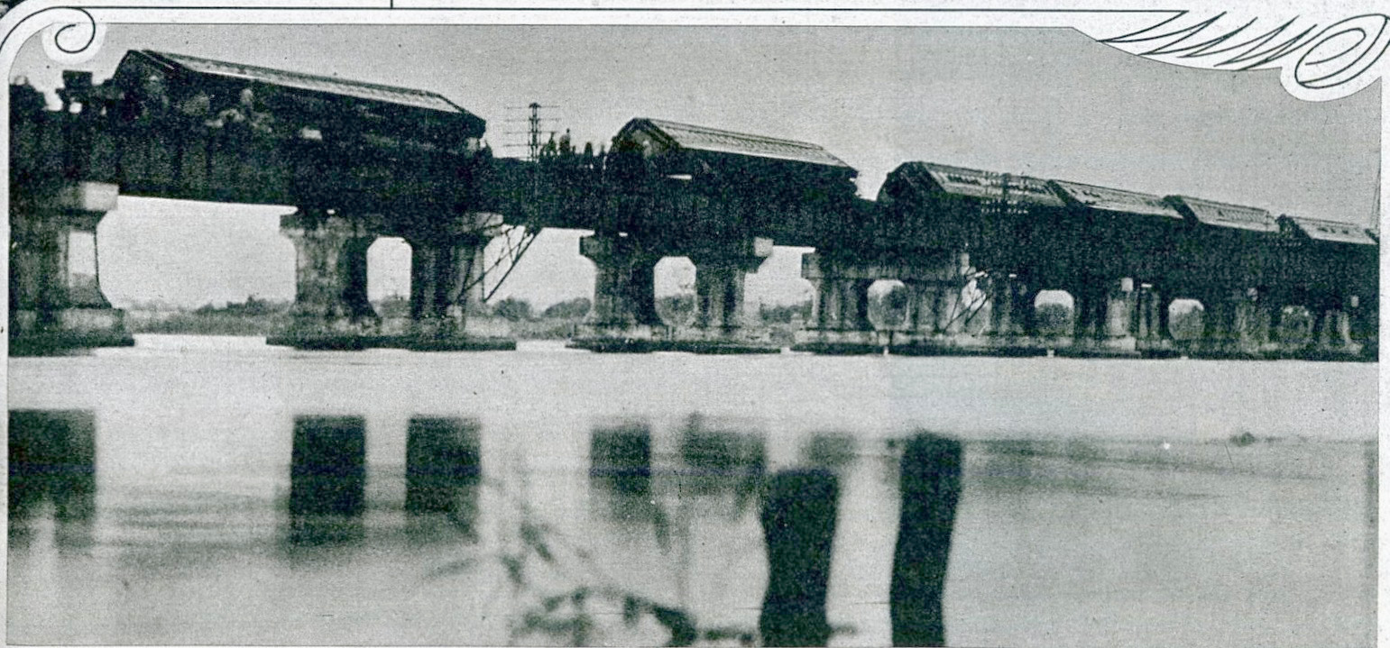 1934年(昭和9年)9月21日、東海道線瀬田川橋梁での室戸台風による列車脱線転覆事故の遠景。